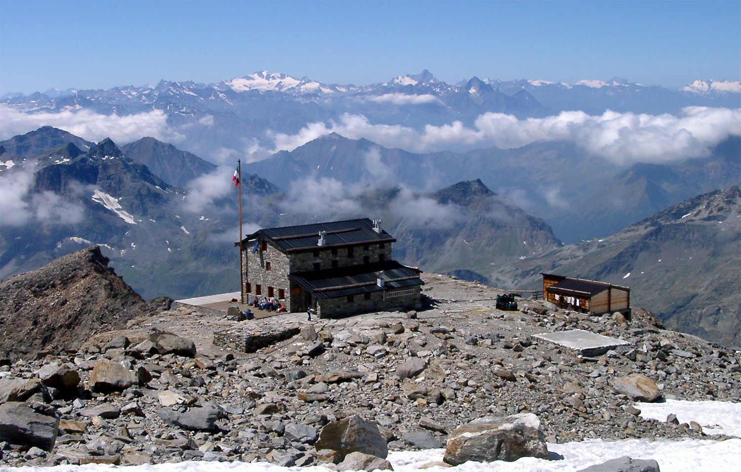 Rifugio Citta di Mantova